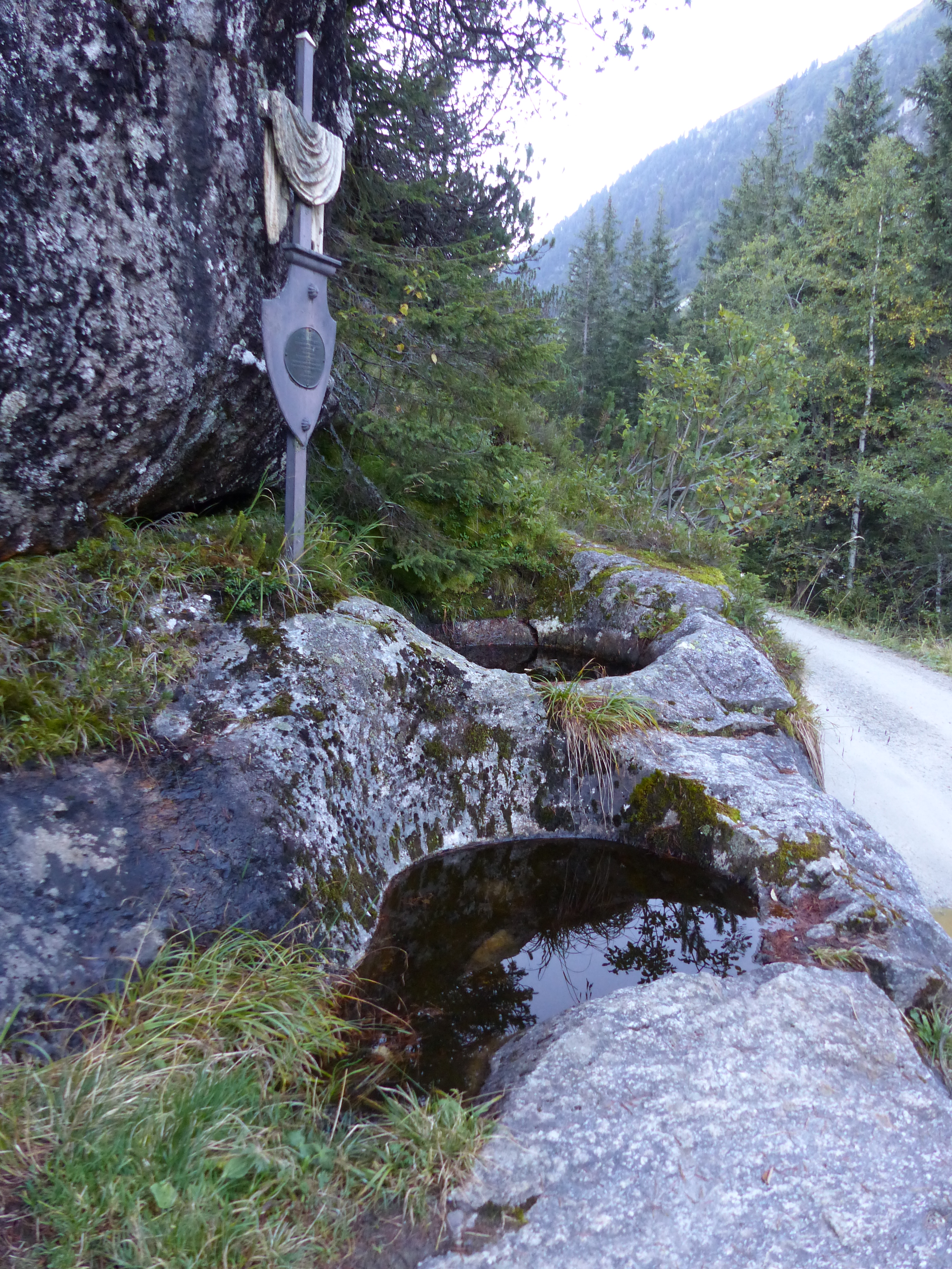 Gletschertöpfe oberhalb der Berndlalm im Obersulzbachtal This media shows the natural monument in Salzburg with the ID NDM00200.